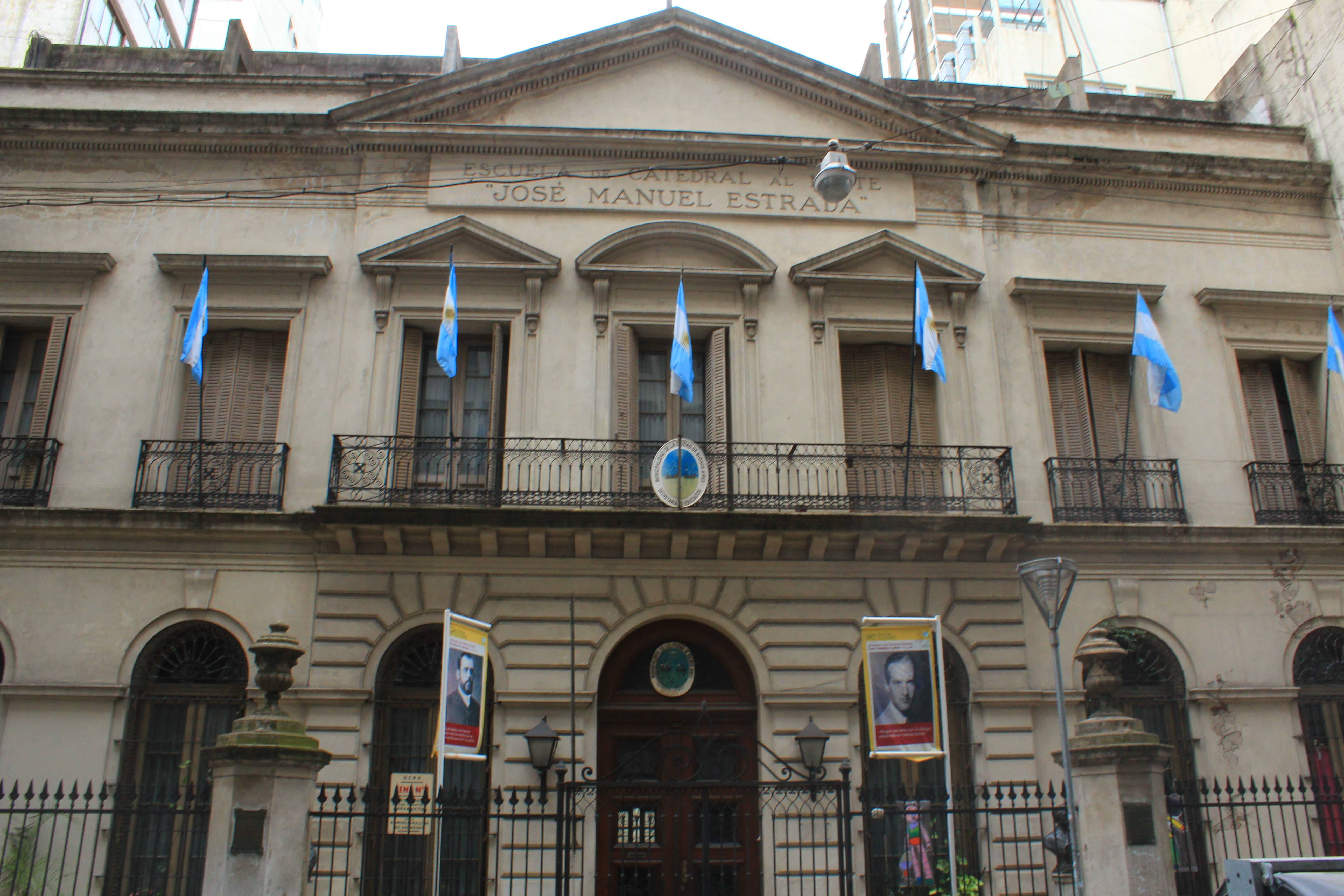 Antigua Escuela Catedral al Norte